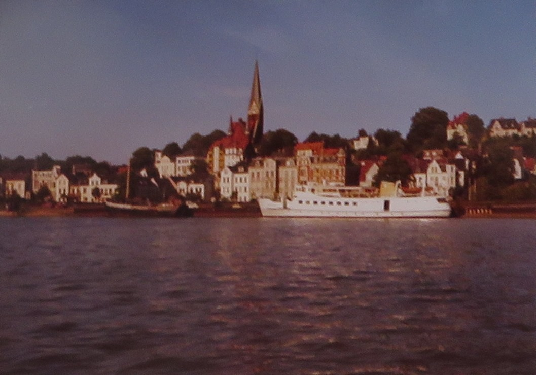 Flensburg; beim Schiff handelt es sich offensichtlich um die (Flensburger) MS Moby Dick; (Heute (2019) dient sie als Marittima in Travemünde) - vgl.